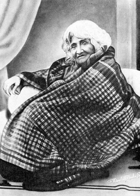 Hazrat Babajan, Pune, India